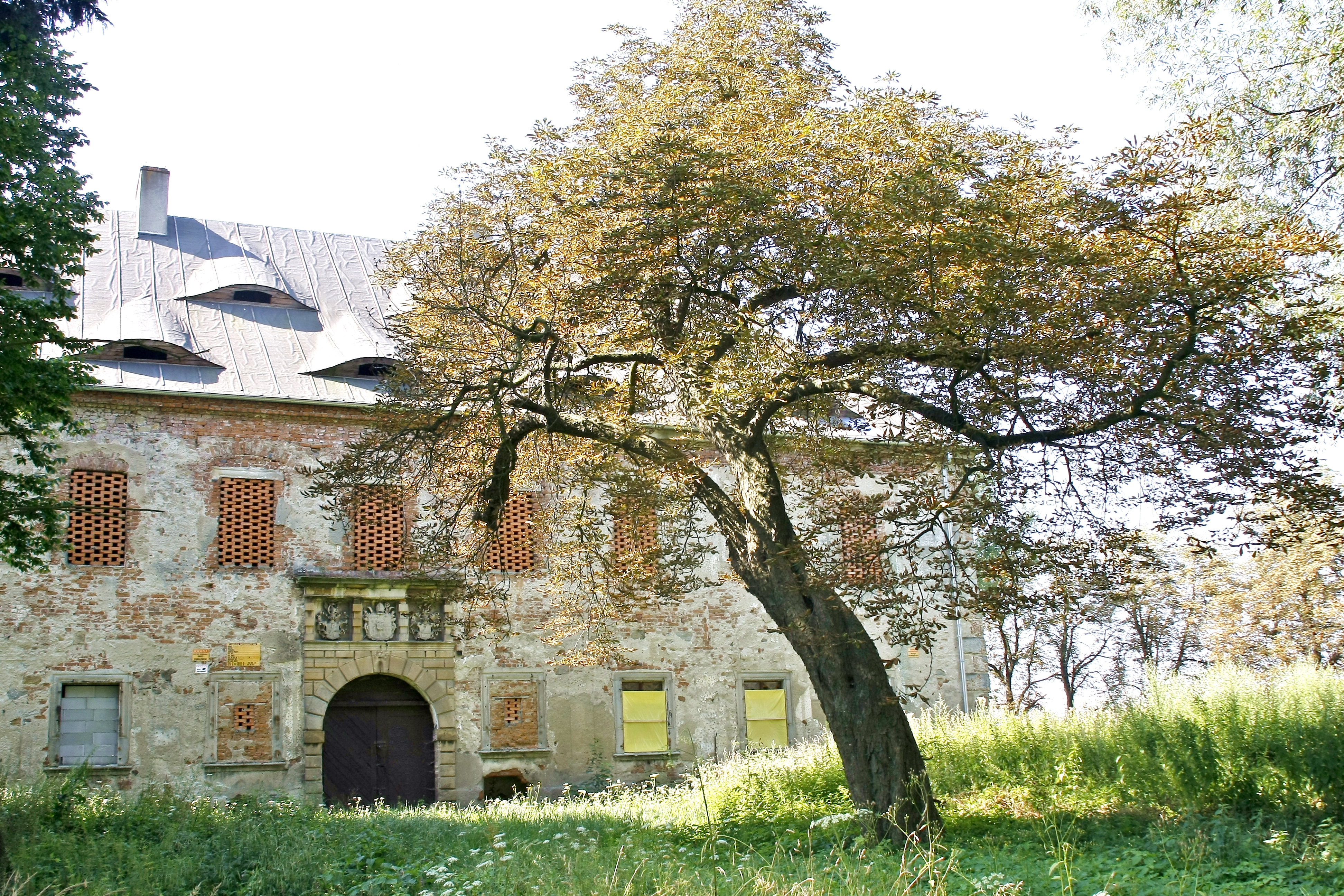 Siestrzechowice, zespół pałacowy (nr 25a), kon. XVI, XIX